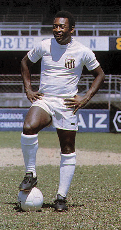 Pelé en session antes de la final contra Boca